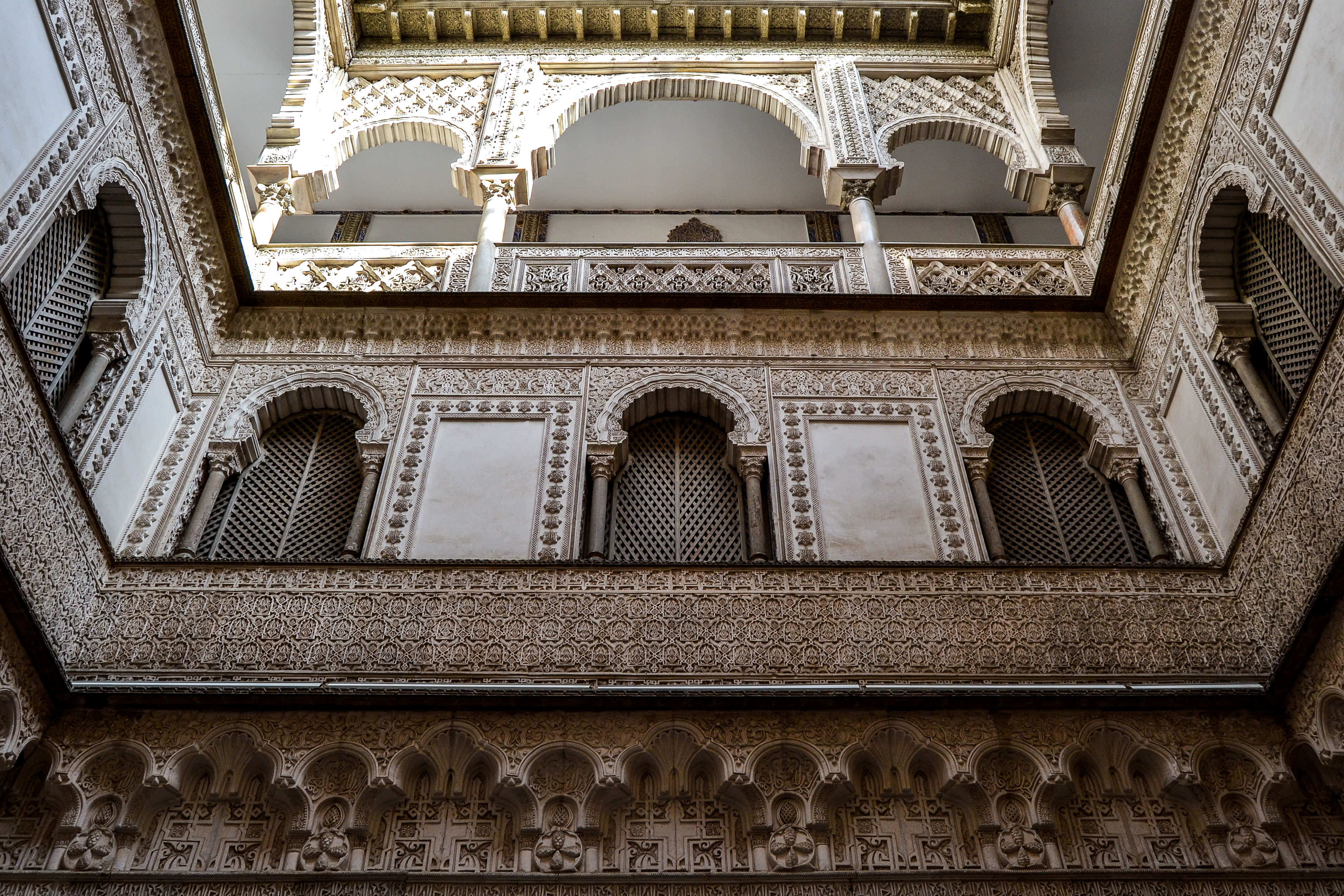 Vista de las galerías superiores del patio de las Muñecas del Real Alcázar de Sevilla.